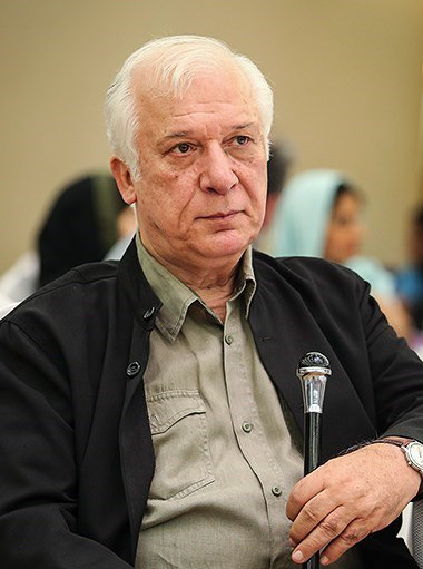 مراسم اعطای گواهینامه درجه یک هنری به ۱۸ نفر از هنرمندان سینما و تقدیر از هیئت‌های انتخاب، داوری و برگزاری بخش بین‌الملل سی‌وسومین جشنواره فیلم فجر در هتل پارسیان آزادی برگزار شد.